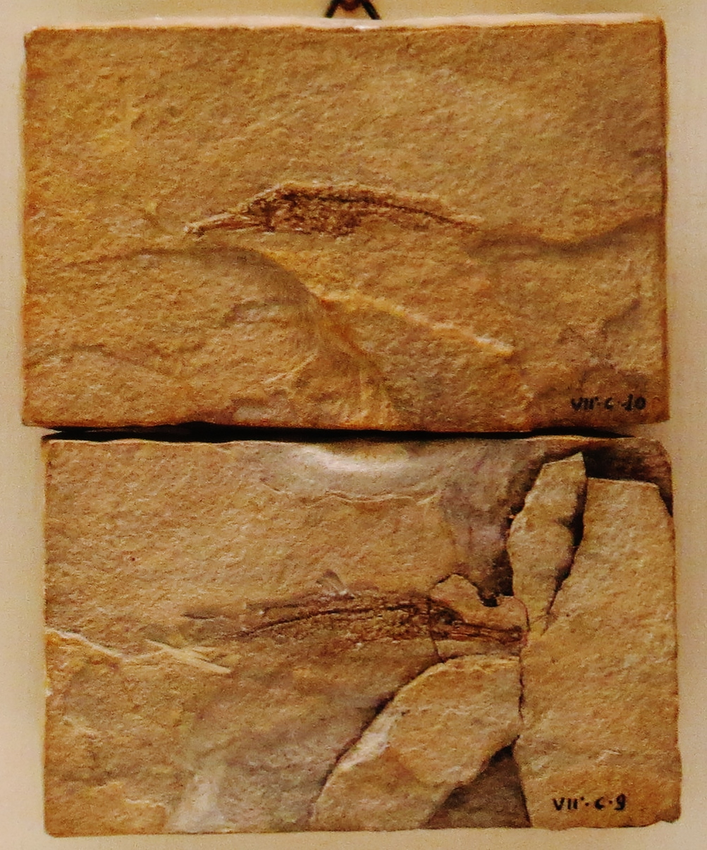 Fossil - Took the picture at Museo di storia naturale di Verona